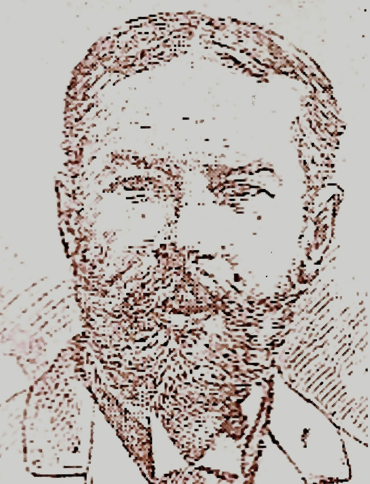 Portrait de dirigeant sportif français